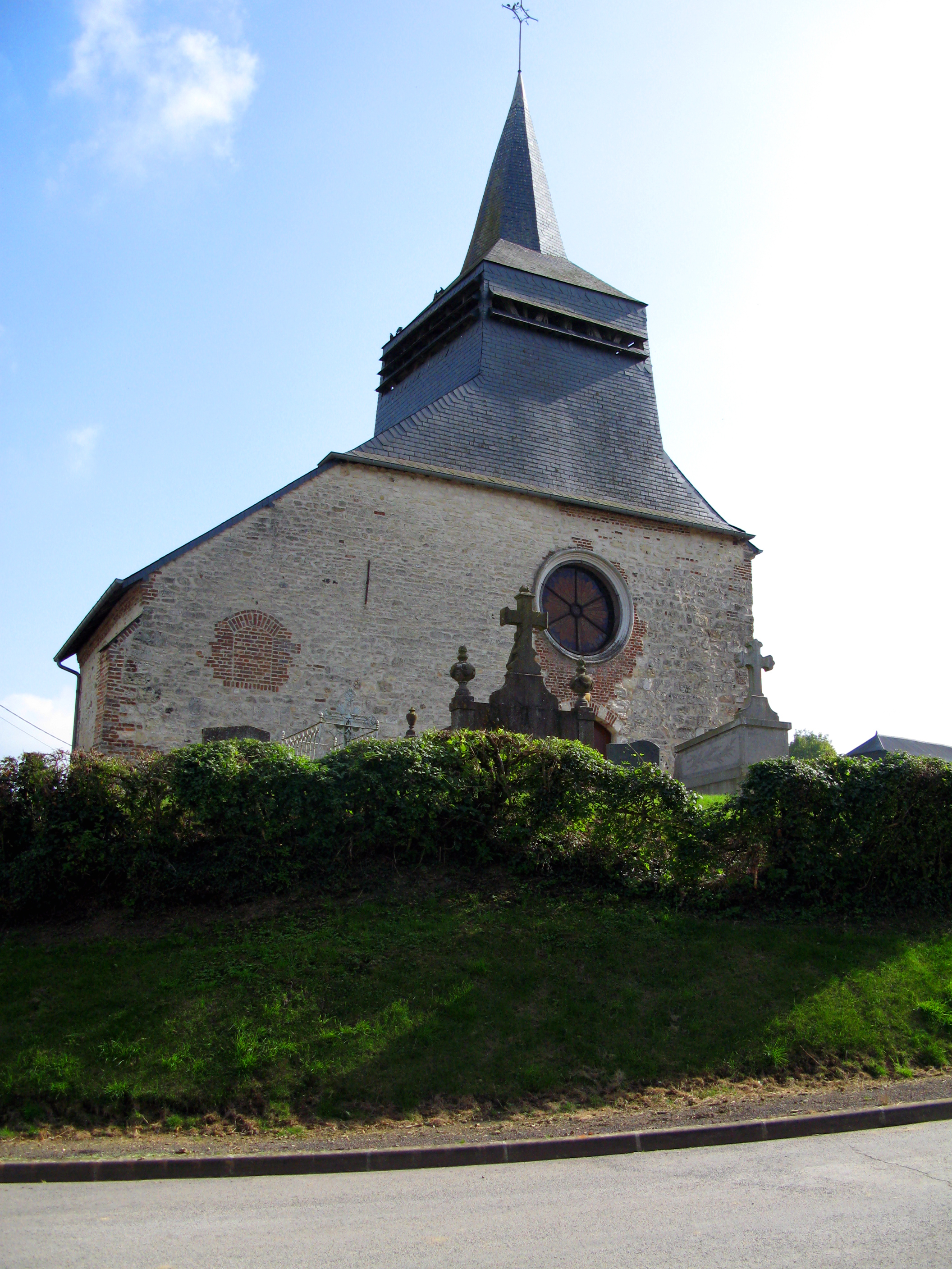 Dagny-Lambercy (Aisne, France) - La façade Ouest de l'église.